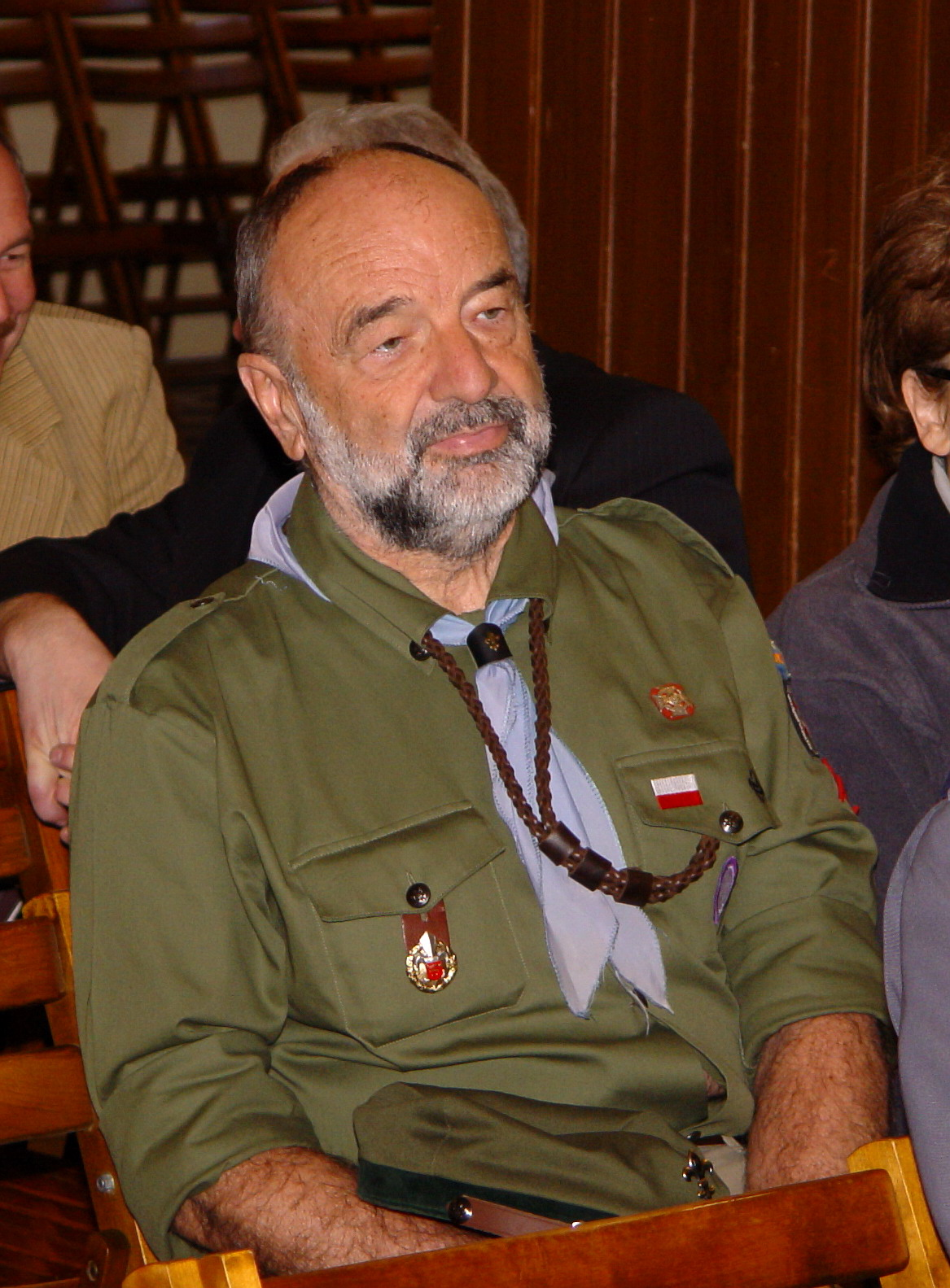 Senator Adam Massalski, Msza Święta w intencji harcerzy w kościele NPNMP w Busku-Zdroju, 25 kwietnia 2008 r.